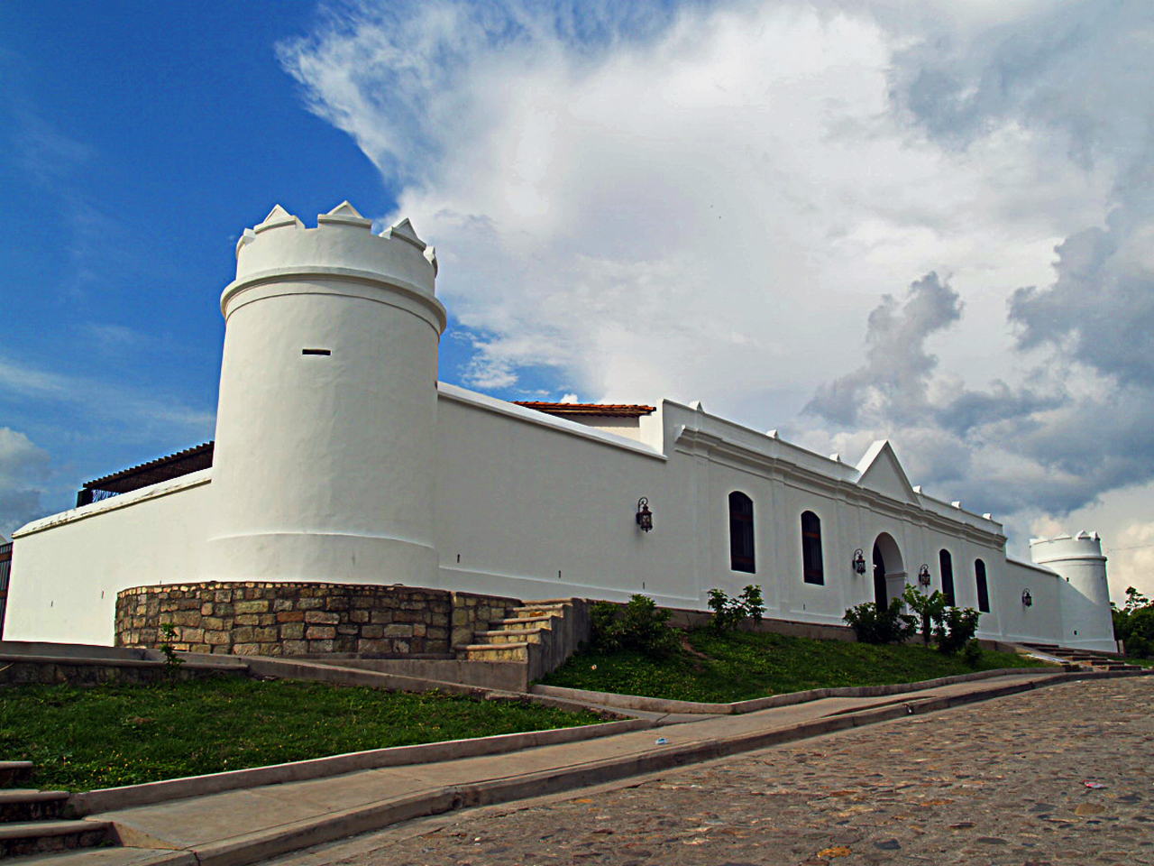 Museo Casa K'inich — en Fuerte Cabañas, Honduras. : Museo Casa K'inich